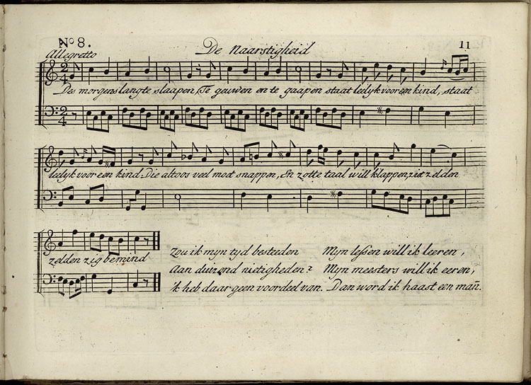 Gedigten voor Kinderen van Mr. H. van Alphen, in Muziek gezett, door C.E. Graaf, s.d., uitgegeven bij Markordt in Amsterdam